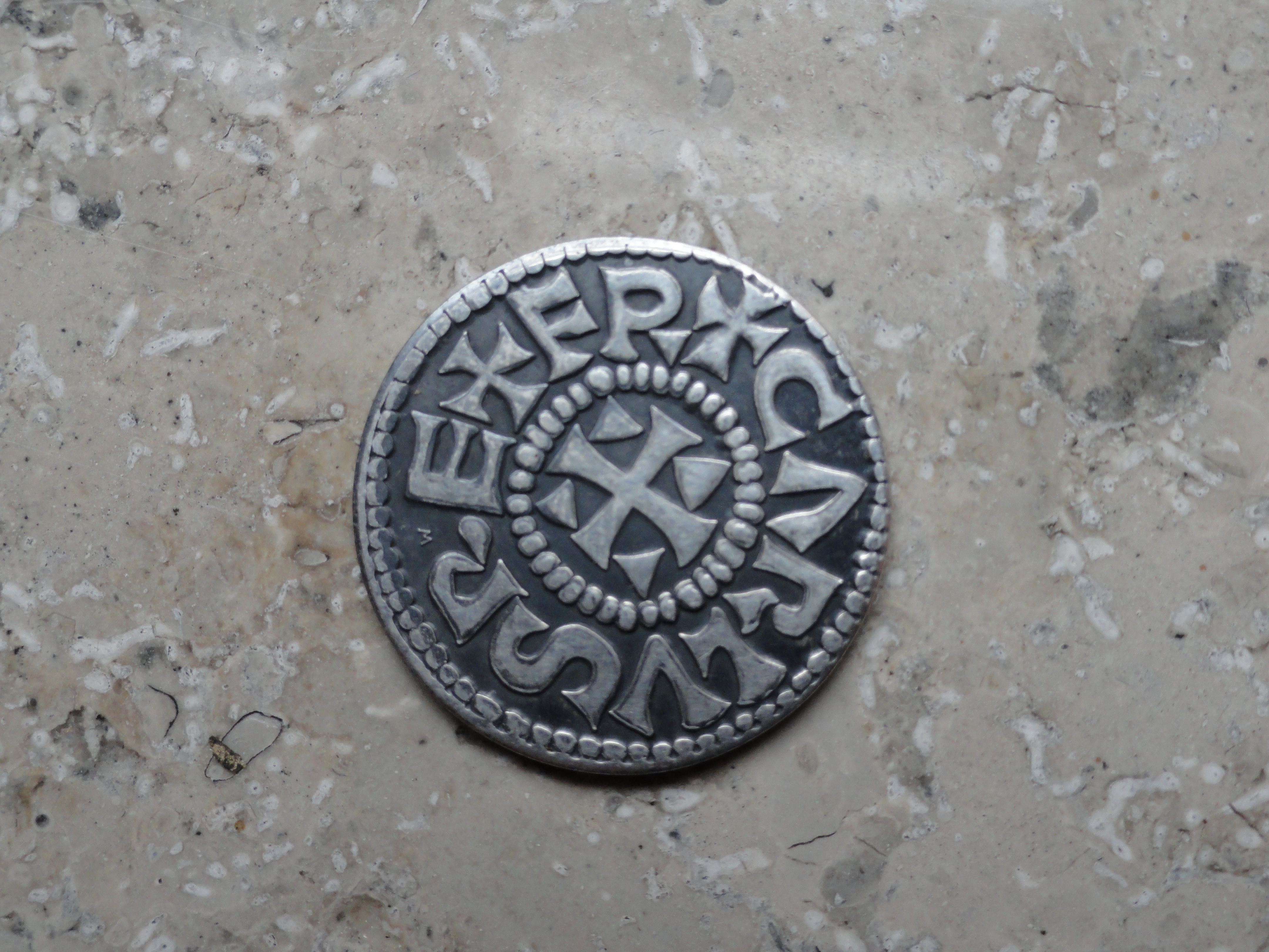 Replik der im Aachener Dom gefundenen Silbermünze. Diese Replik wurde unter dem Hildegardplatz in Kempten in der Zeitkapsel mitvergraben.